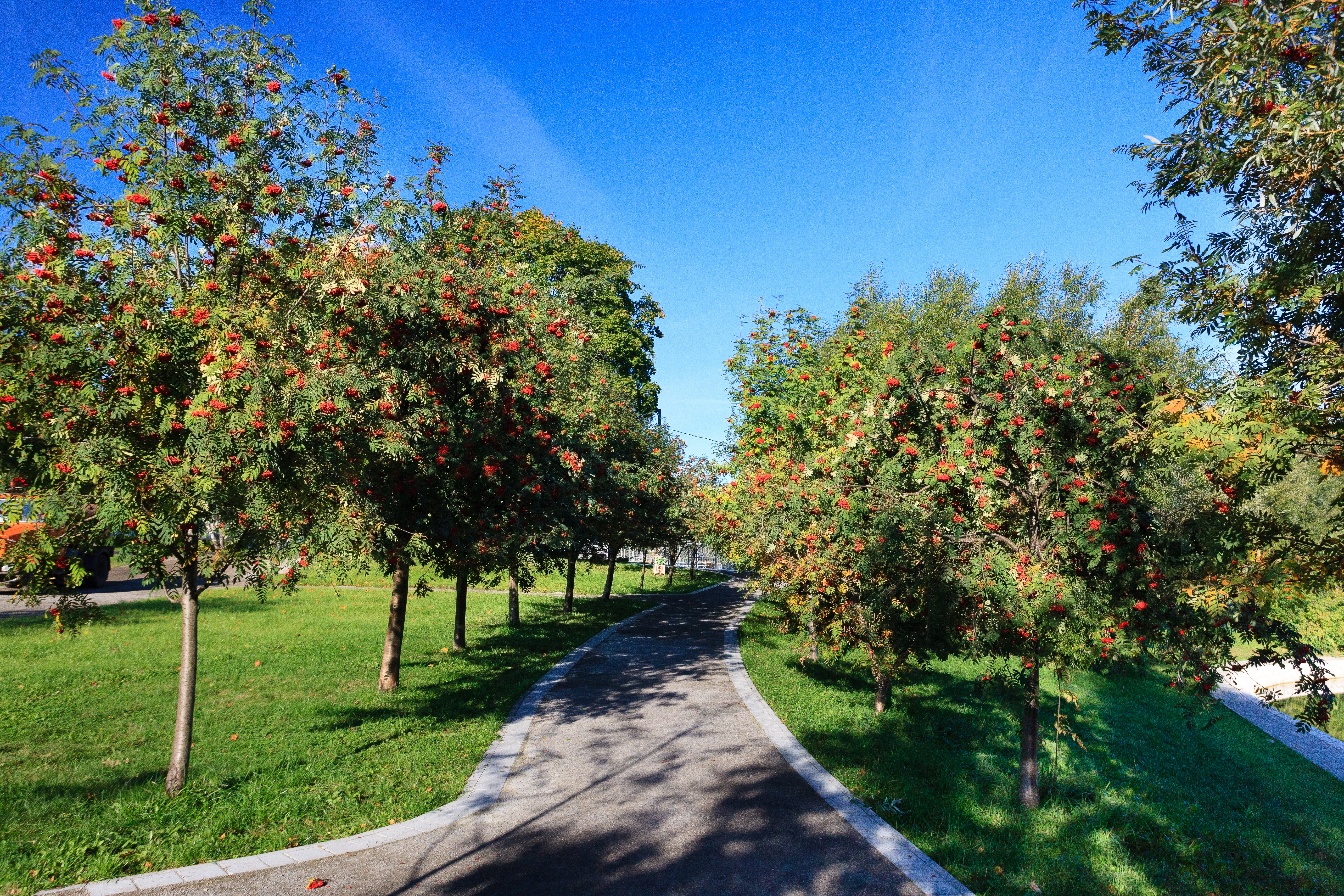 Аллея Алисы Селезнёвой в парке Дружбы, заложена 6 октября 2001 года. Парк Дружбы был основан в честь VI Всемирного фестиваля молодёжи и студентов 1957 года. Архитекторы - Галина Ежова, Анатолий Савин, Валентин Иванов, руководитель проекта - Виталий Долганов.